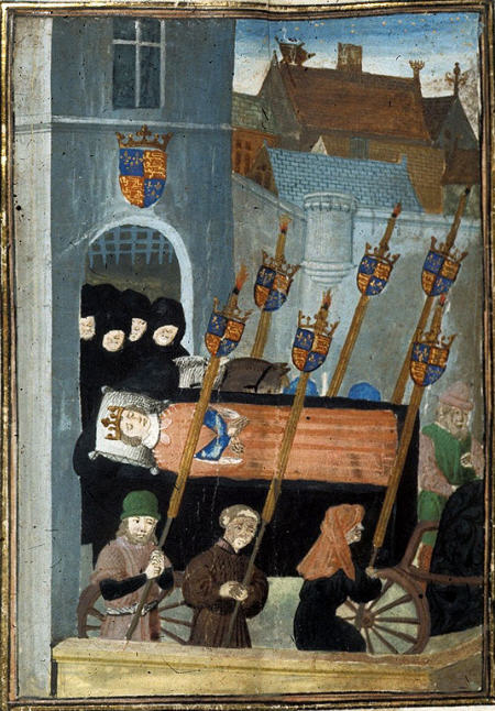 Richard II. Anglický -pohřeb